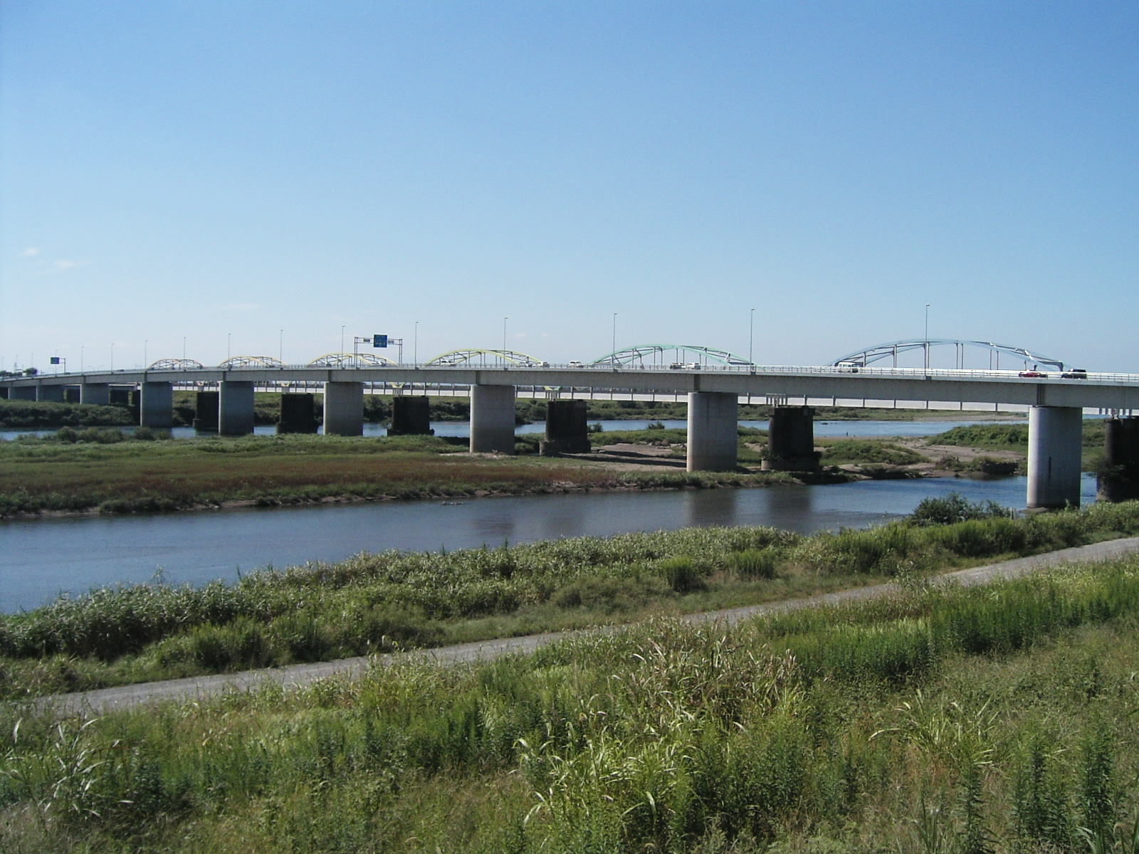 内容： 利根川 昭和橋 群馬県明和町側から撮影 撮影日：2006年9月24日 撮影者：竹太郎（投稿者）